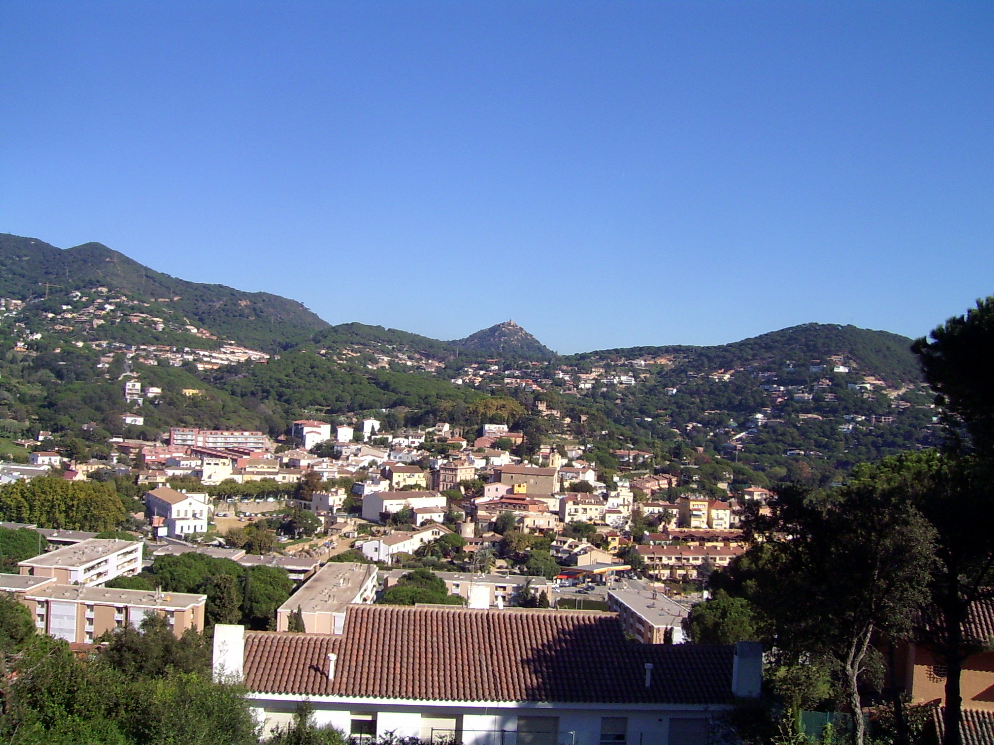 Cabrils, comarca del Maresme. Al centre la muntanya de Burriach, amb el castell del mateix nom.